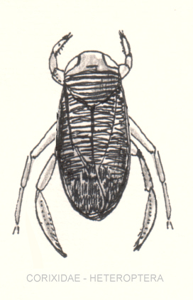 Corixidae (Heteroptera)